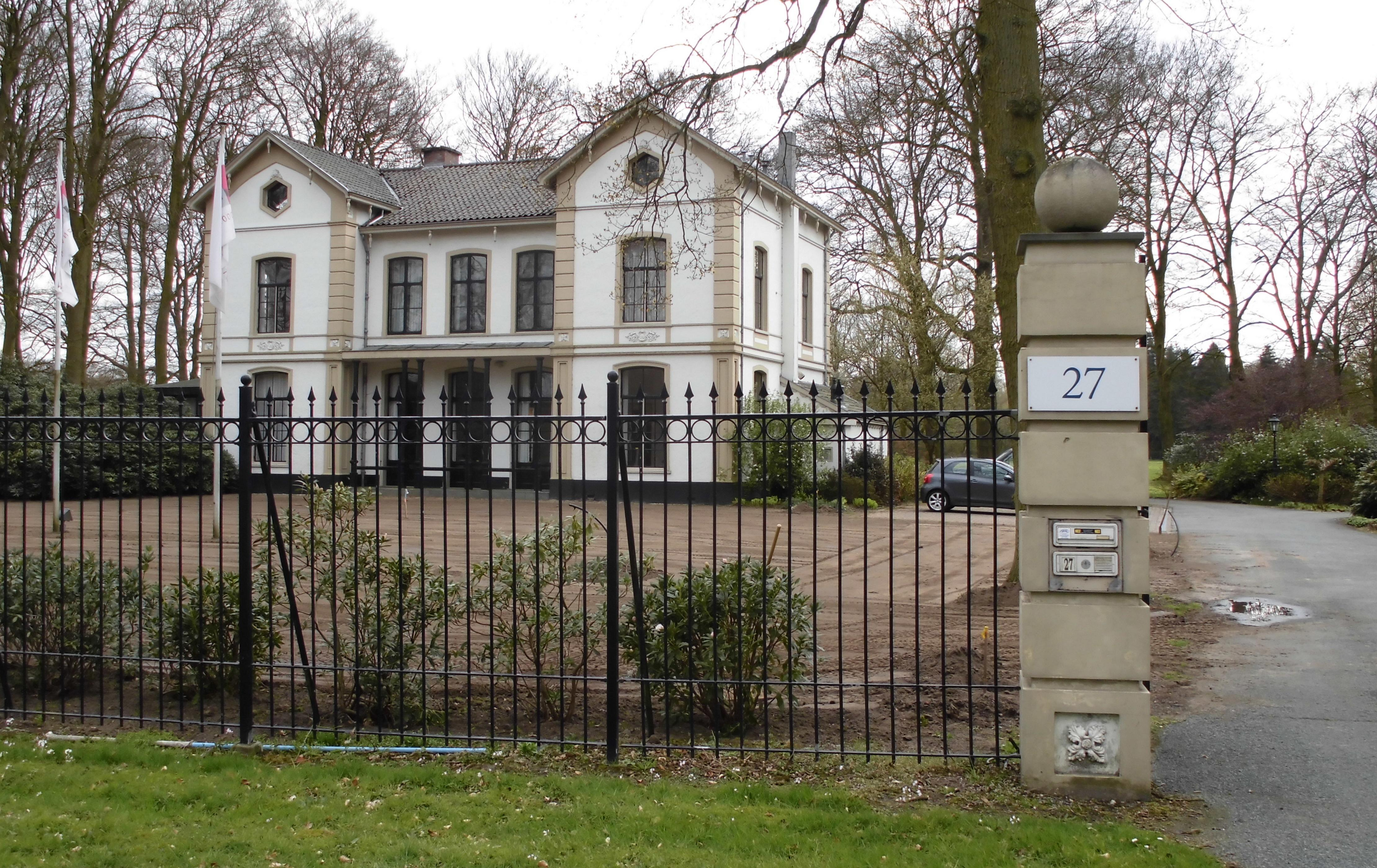 Doornveld, Driebergsestraatweg 27 Doorn